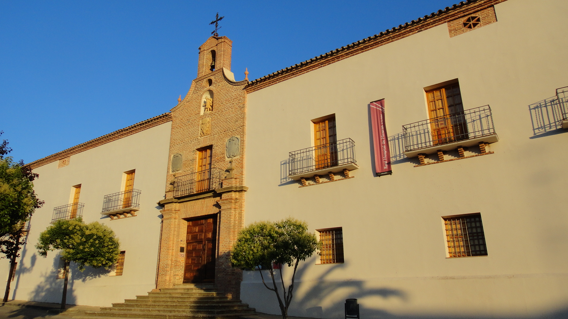 Fachada principal del Real Hospital de Mineros de San Rafael, edificio construido entre 1755 y 1773, en Almadén (Provincia de Ciudad Real - España). Actualmente es la sede del Archivo Histórico de Minas de Almadén, de la Fundación Almadén-Francisco Javier de Villegas y del Museo del Minero.